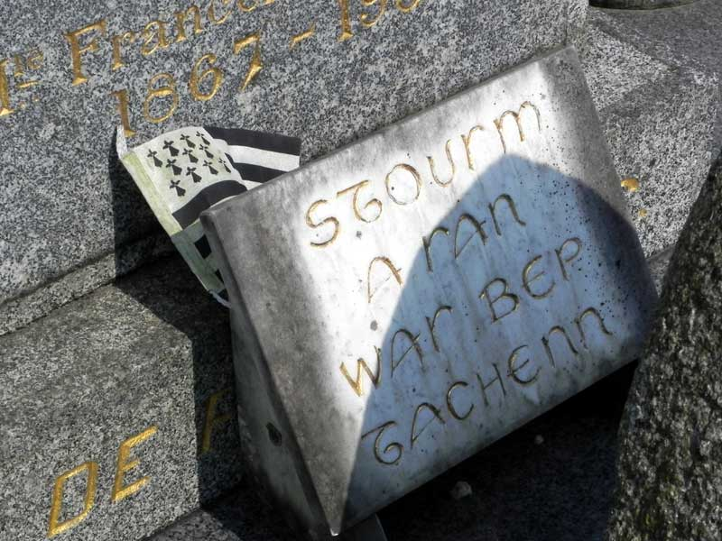 Anjela Duval : Plaque tombaleBrezhoneg: Anjela Duval : dedi war ar bez, Plouared, Bro-Dreger